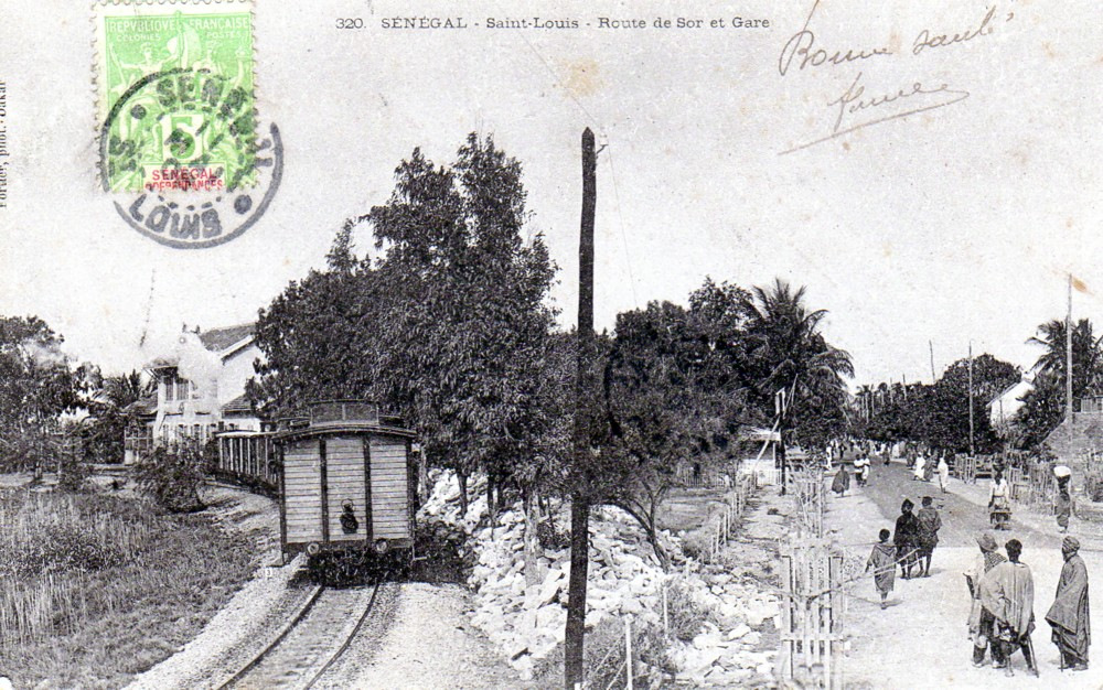 La gare primitive de Saint Louis alors commune française ayant un député.